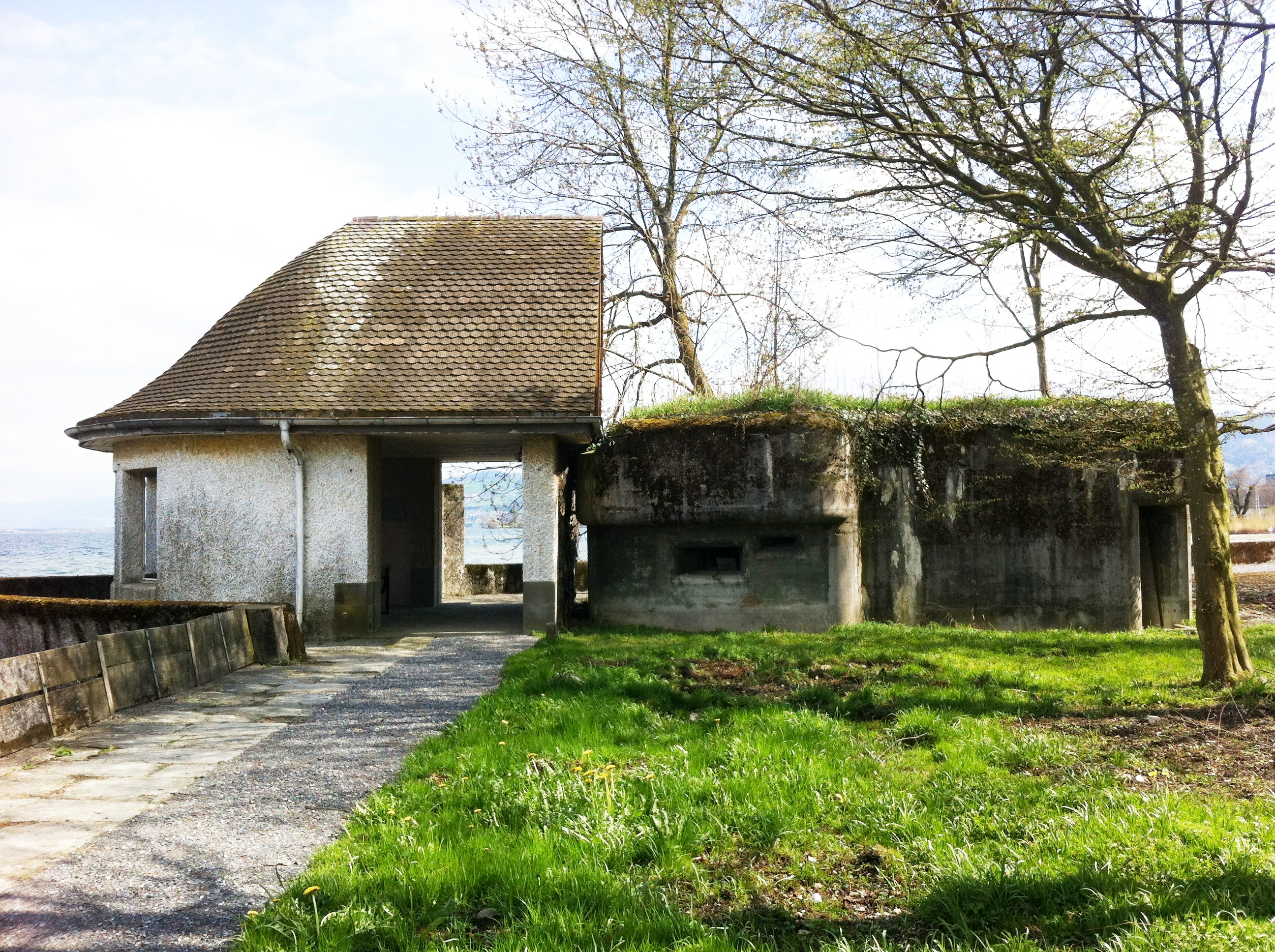 Infanteriebunker Steinach SG, Schweiz